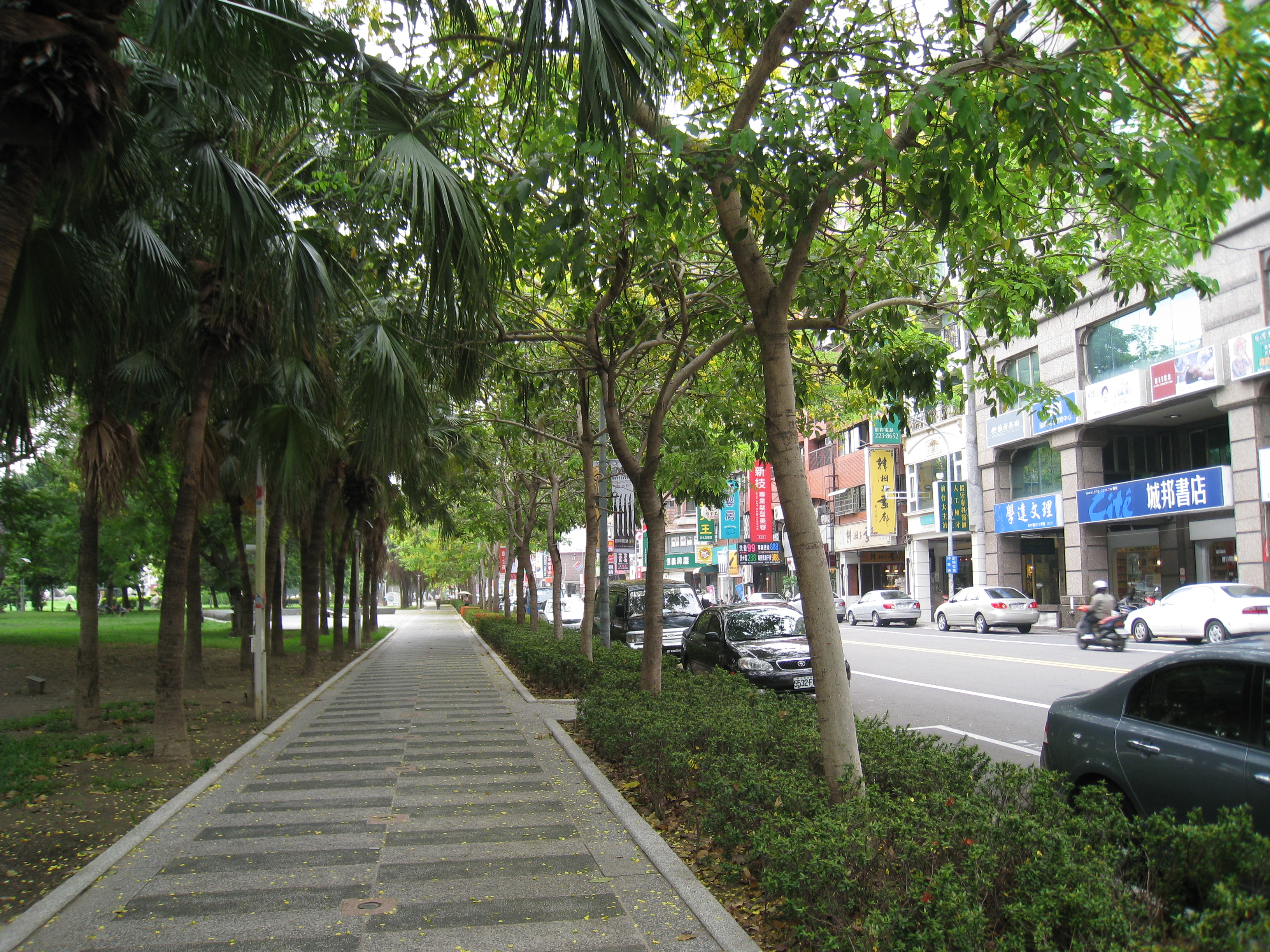 file@panoramio